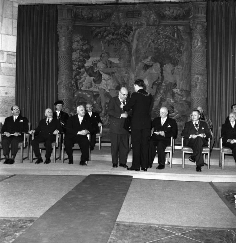 Verleihung des Karlspreises der Stadt Aachen an Paul Henri Spaak im Krönungssaal des Rathauses